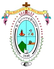 Stemma Tierra Blanca, Guanajuato